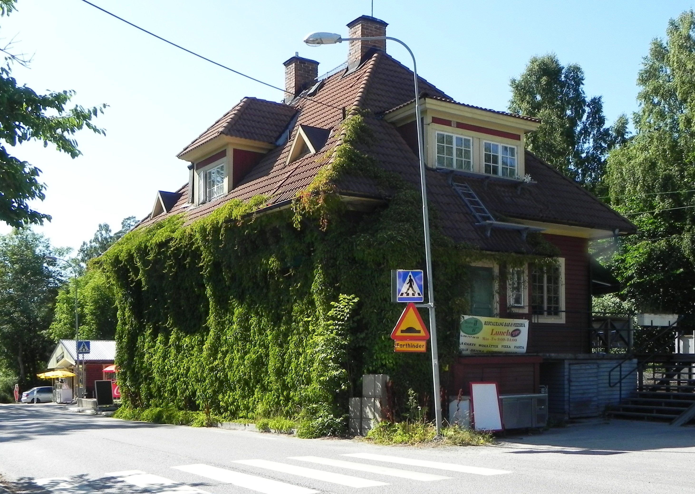 Stationshuset Solsidan station